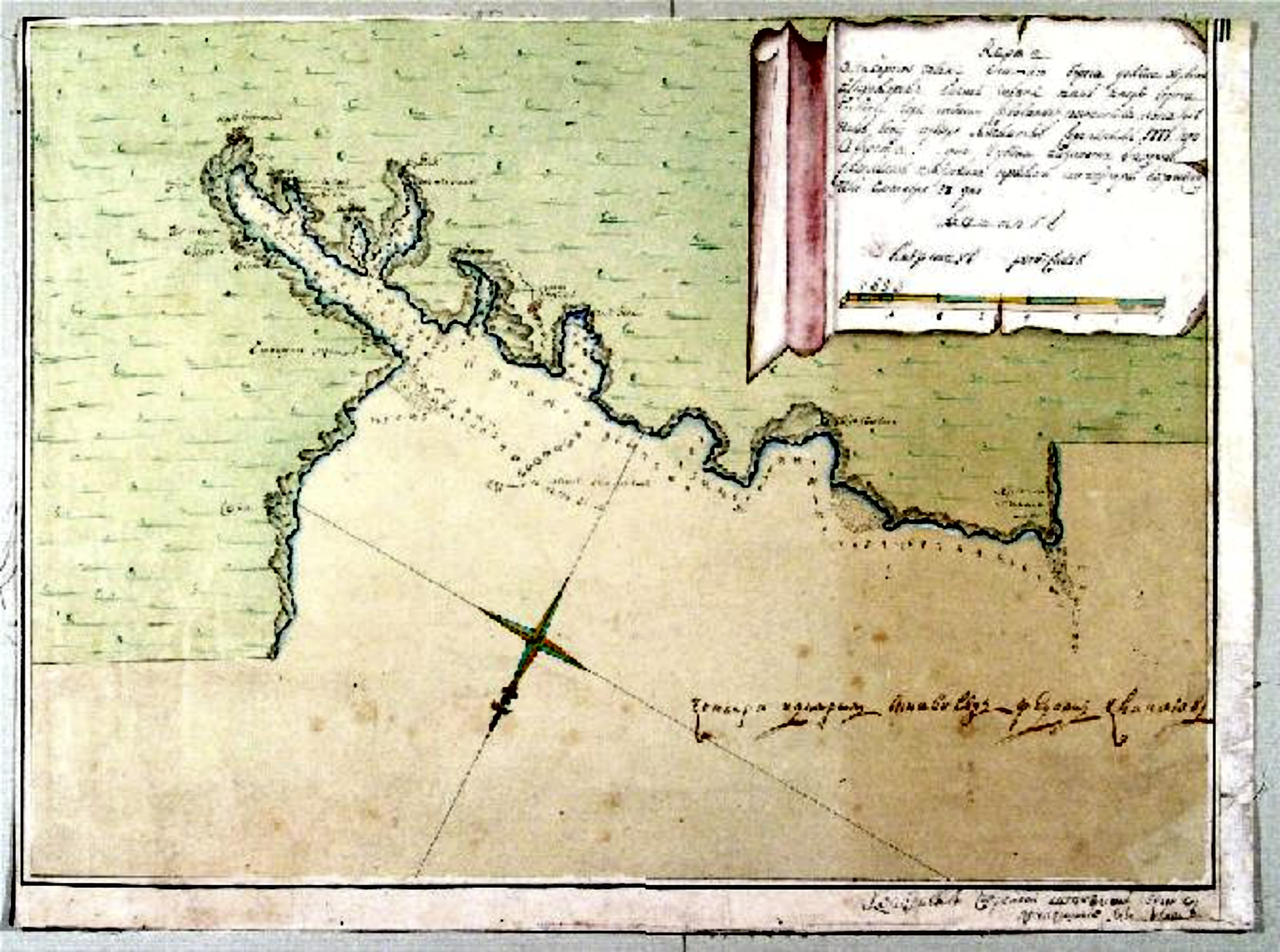 И. М. Берсенев. "Карта Ахтиарской гавани от Бельбека до Херсонского мыса." Масштаб – 1,5 версты в англ. дюйме. Июнь 1783 г. Рукопись, тушь, чернила, акварель. Под картушем надпись: “Контр-адмиралу и Кавалеру Федоту Алексеевичу Клакачеву”